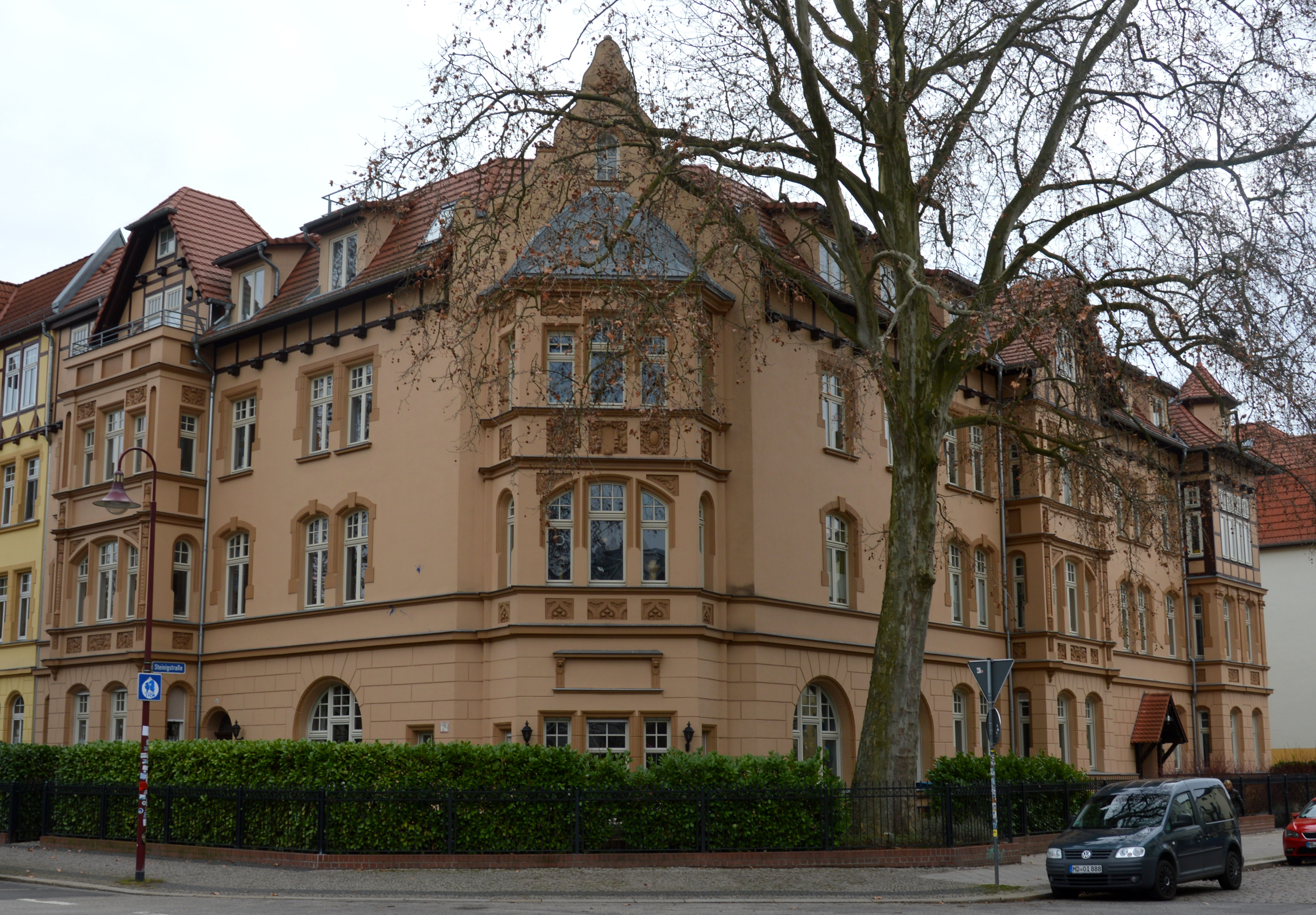 Haus Goethestraße 39 in Magdeburg